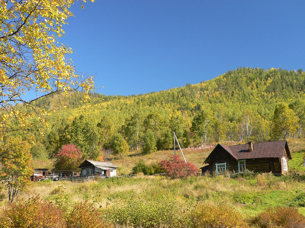 Village near lake baikal, Russia